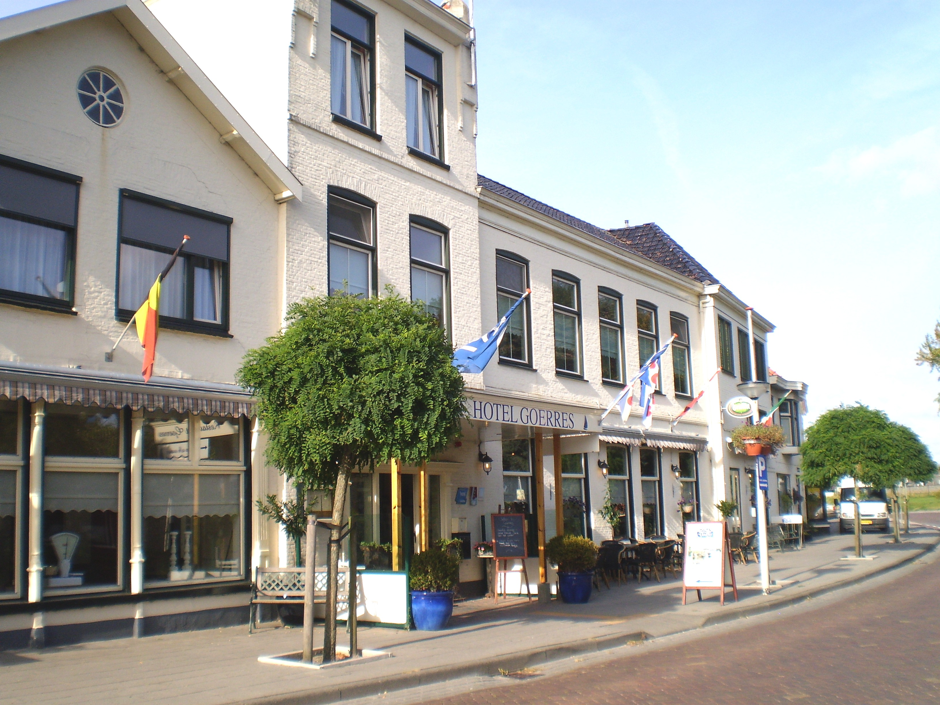 hotel Goerres yn Akkrum.